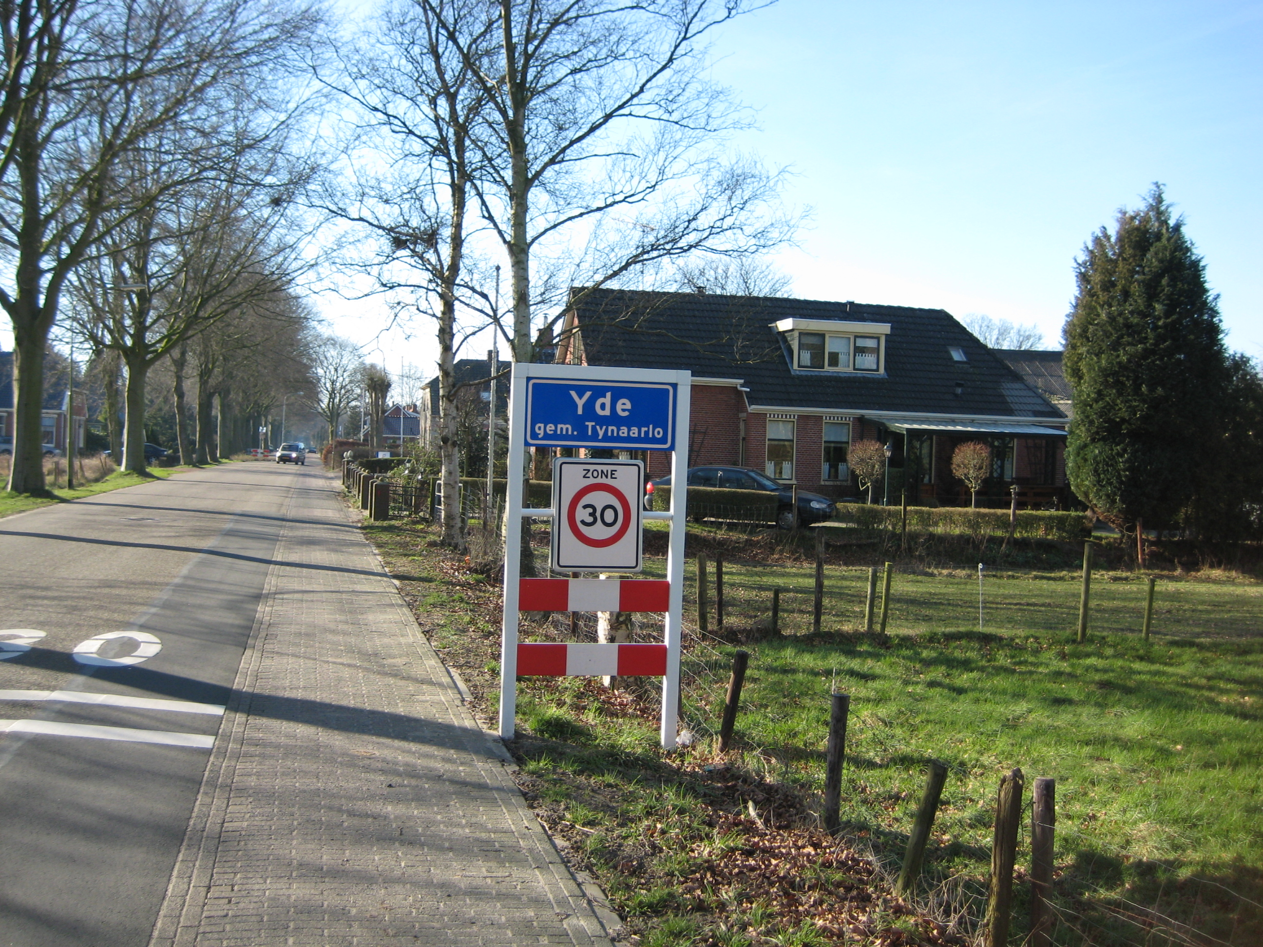 Yde